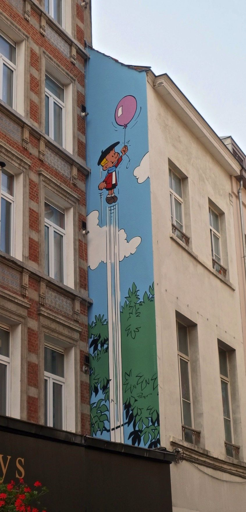 Benni Bärenstark (Benoît Brisefer). Wandgemälde in Brüssel, Rue Haute 119 (Parcours bande dessinée).[1]